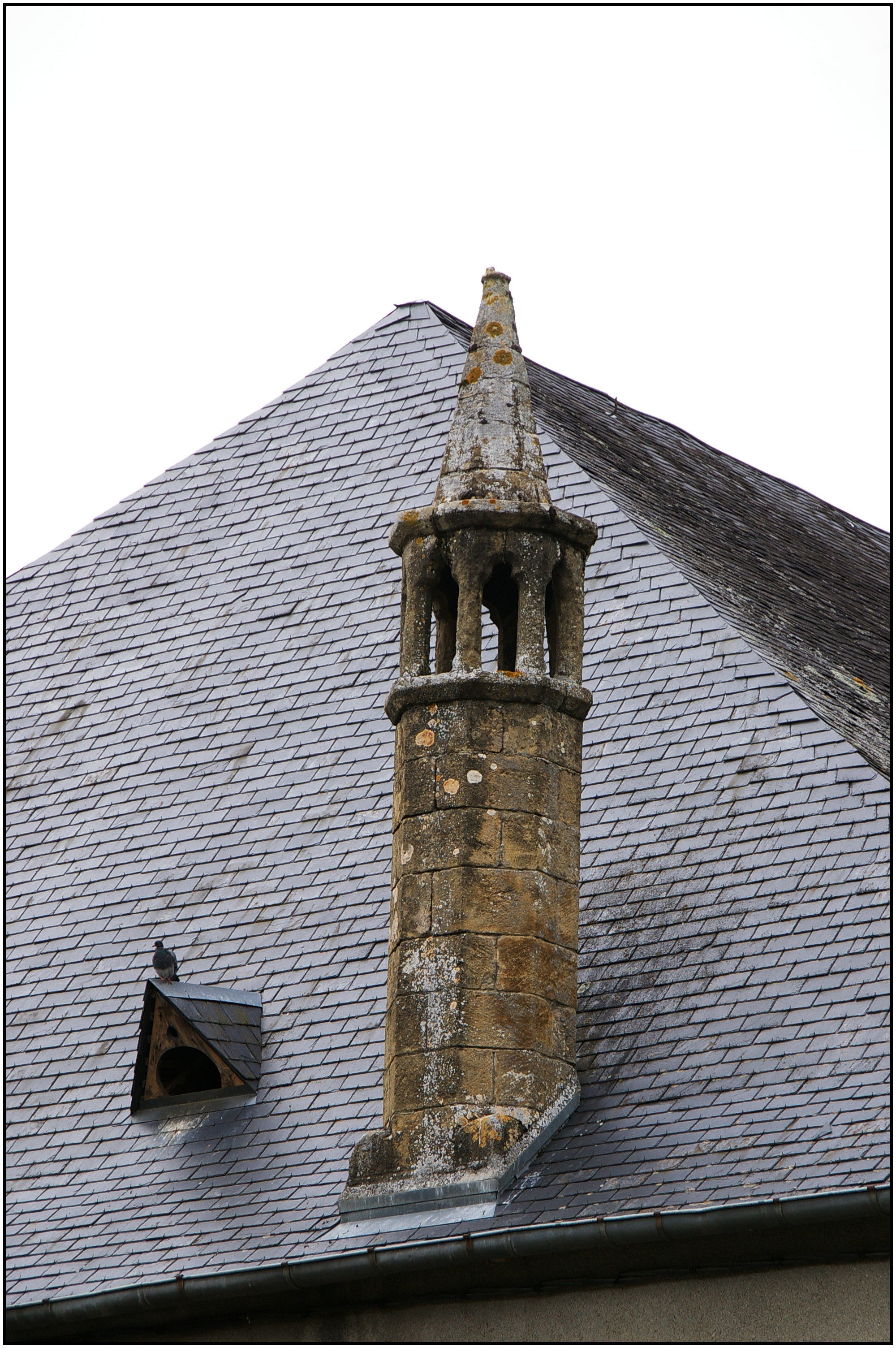 Souche de cheminée en forme de tourelle octogonale, Montignac, Dordogne, France.